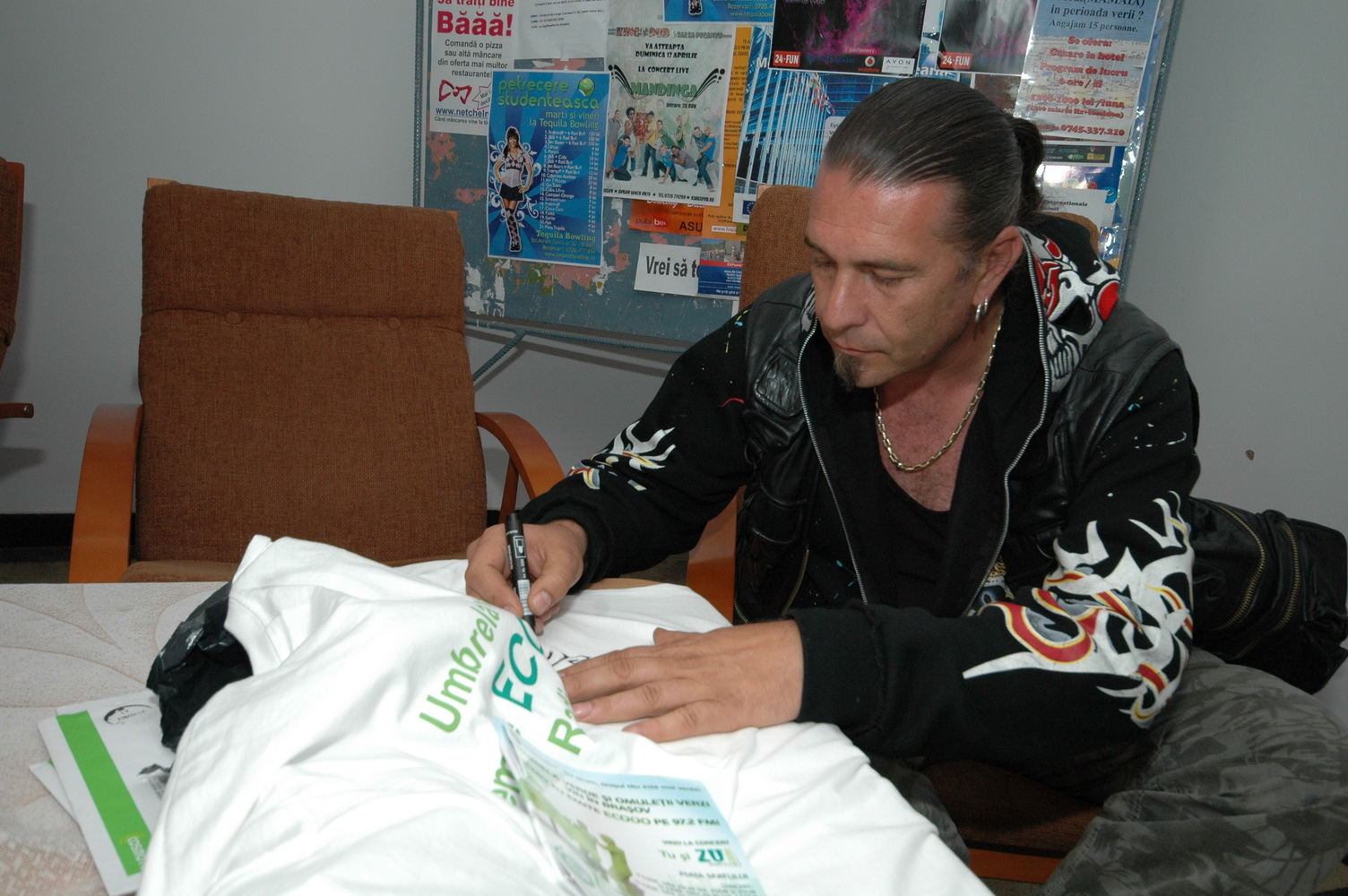 Adi Barar, membru al formatiei Cargo, oferind autografe in campus.